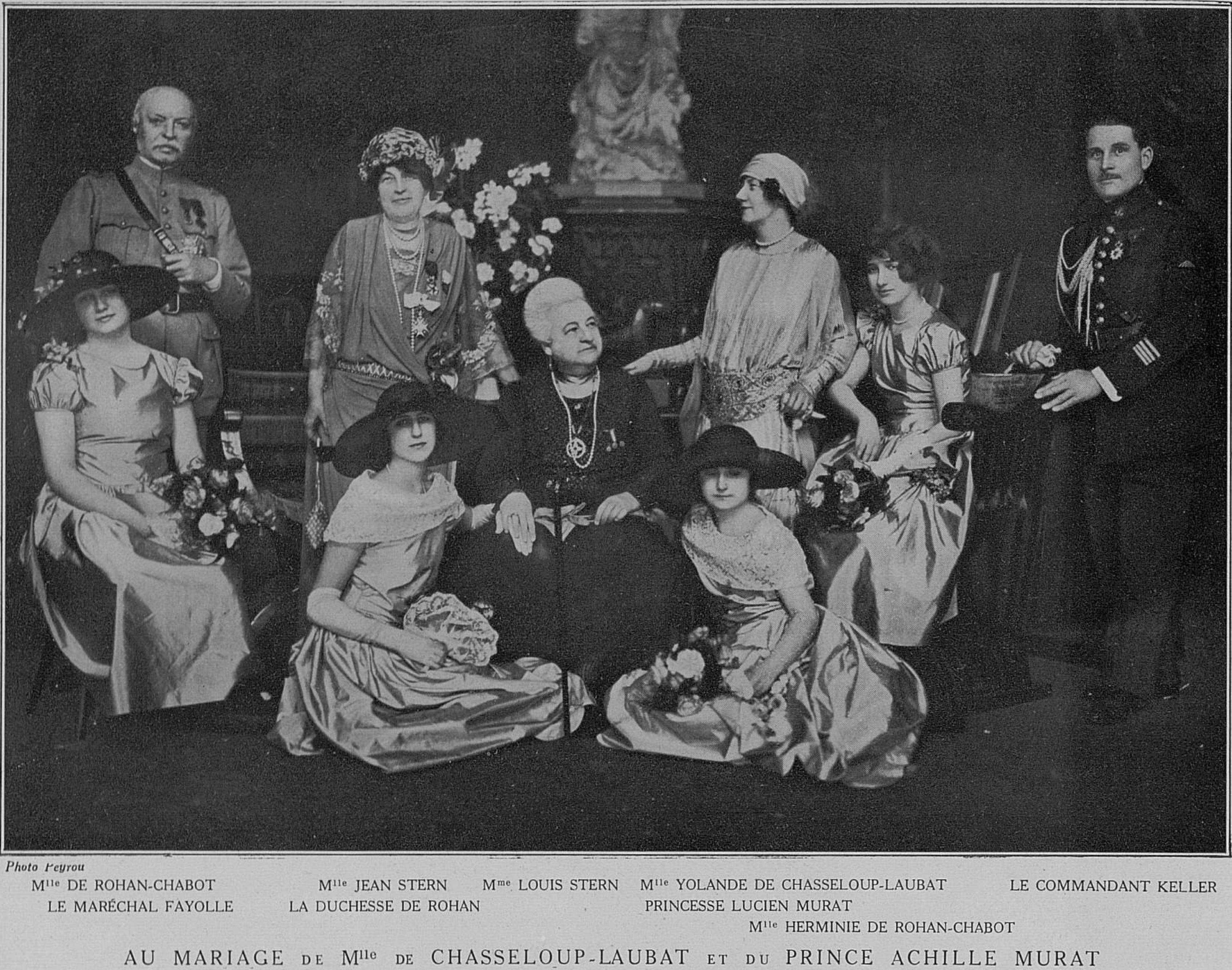 Ernesta Stern entourée de sa famille, au mariage de sa petite-fille Mlle Magdeleine de Chasseloup-Laubat avec le prince Achille Murat : - Mlle de Rohan-Chabot / Mme Jean Stern / Mme Louis Stern / Mlle Yolande de Chasseloup-Laubat / le commandant Keller - la maréchal Fayolle / la duchesse de Rohan /./ princesse Lucien Murat - /././ Mlle Hermine de Rohan-Chabot